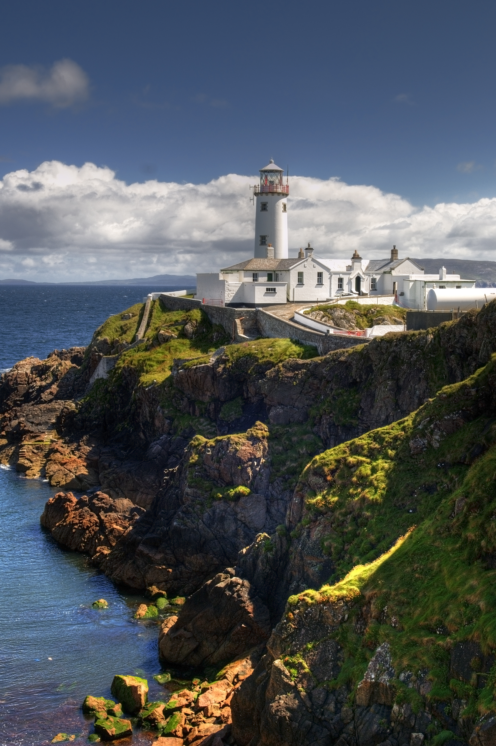 Single frame HDR + tonemapping